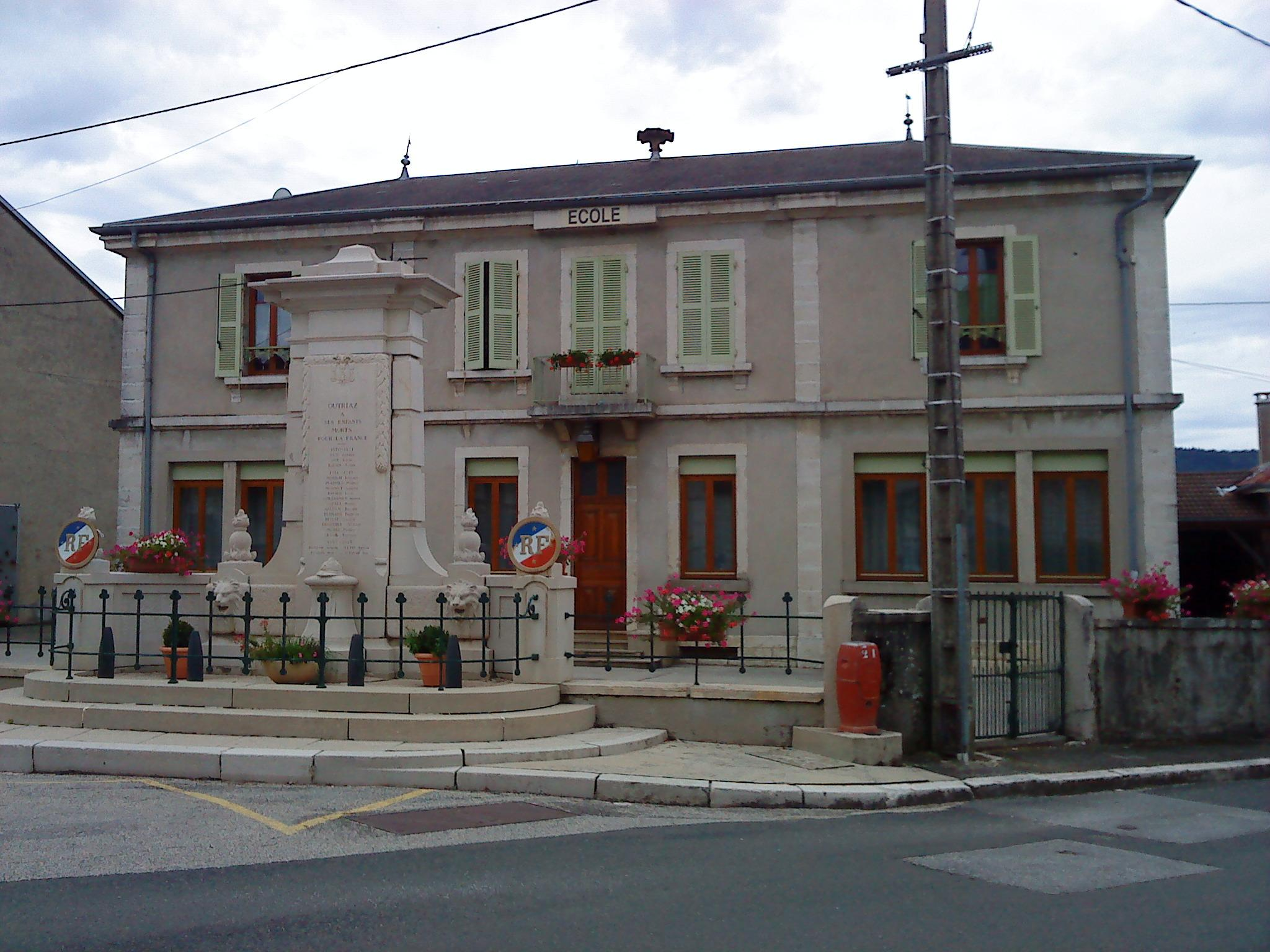 L'école d'Outriaz (Ain, France) avec au premier plan le monument aux morts de la commune